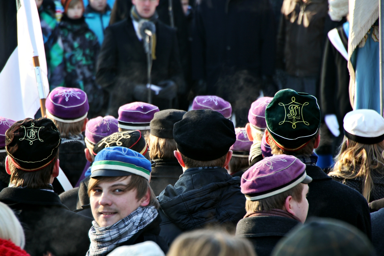 Vabariigi 95. aastapäeva tähistamine Tartu Tähetorni juures. 24-02-2013. TÜ tudengid